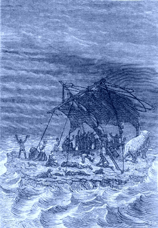 Původní ilustrace Julese Férata k francouzskému vydání knihy J. Verna